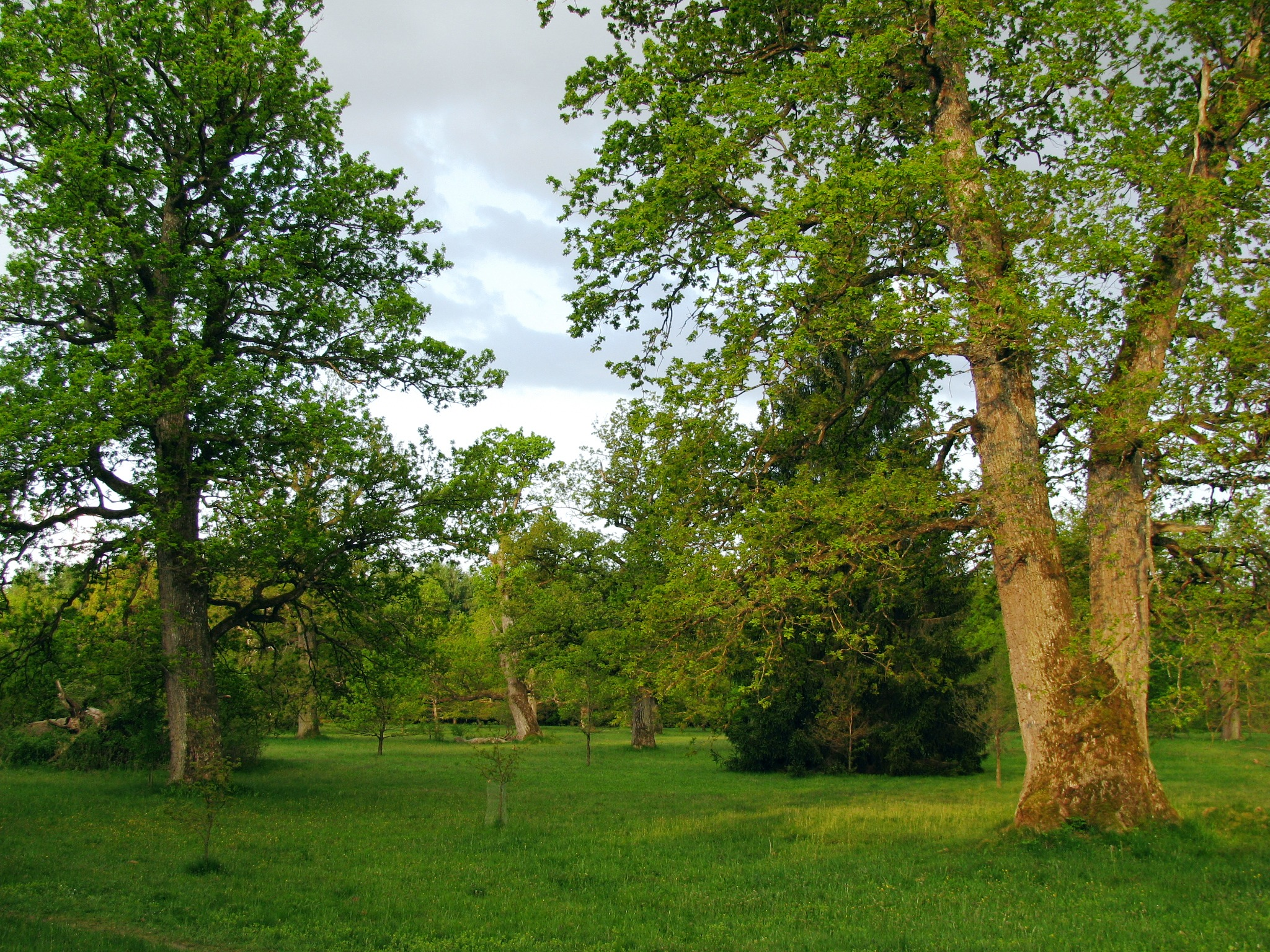 Eichelgarten im Forstenrieder Park, Landkreis München